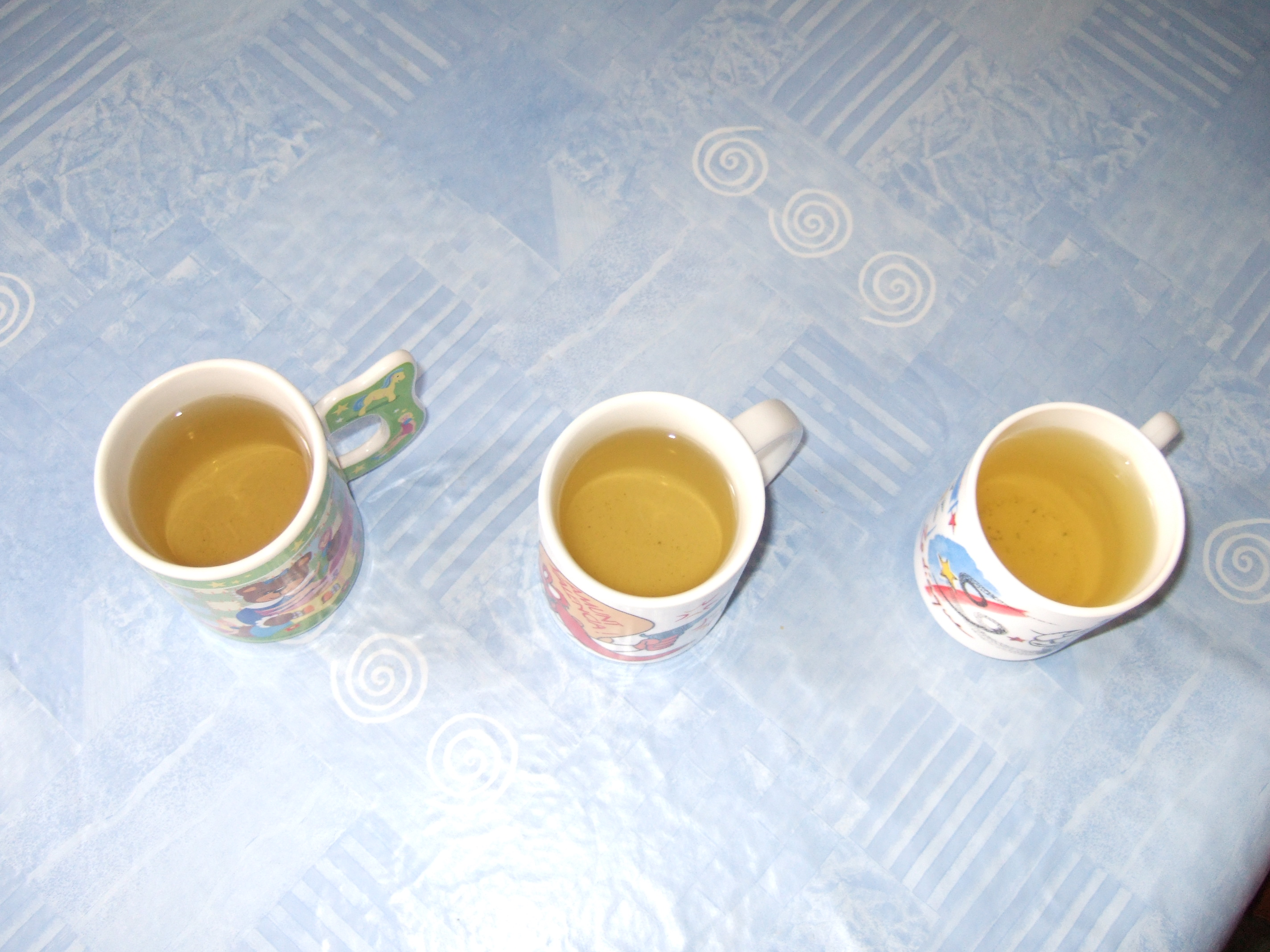 Les 3 infusions succesives du thé Fukujyu